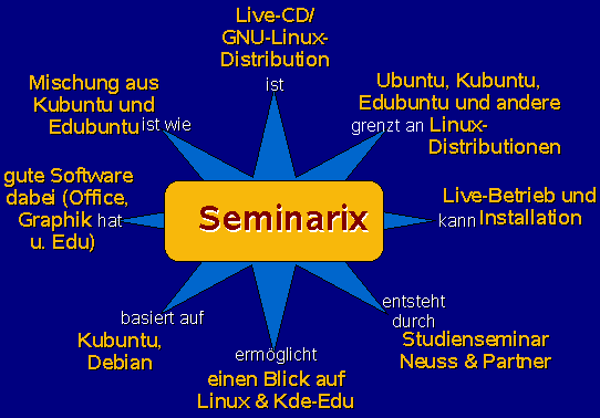 Basisschematische Präsentation: Seminarix